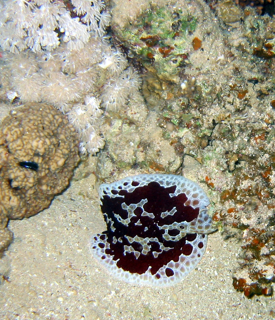 dahab egypt 2003